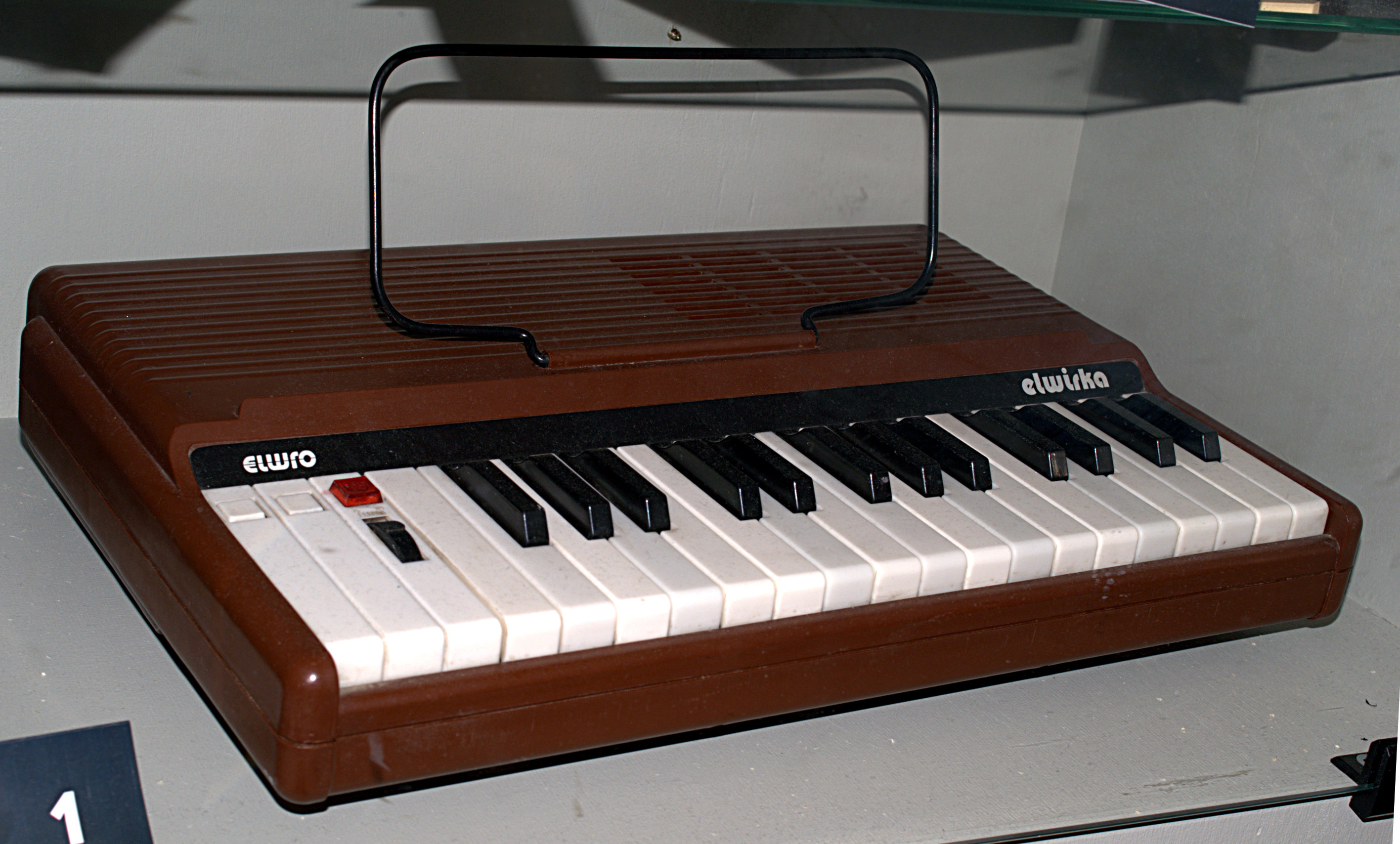 Organy Elwirka - polski zabawkowy syntezator muzyczny